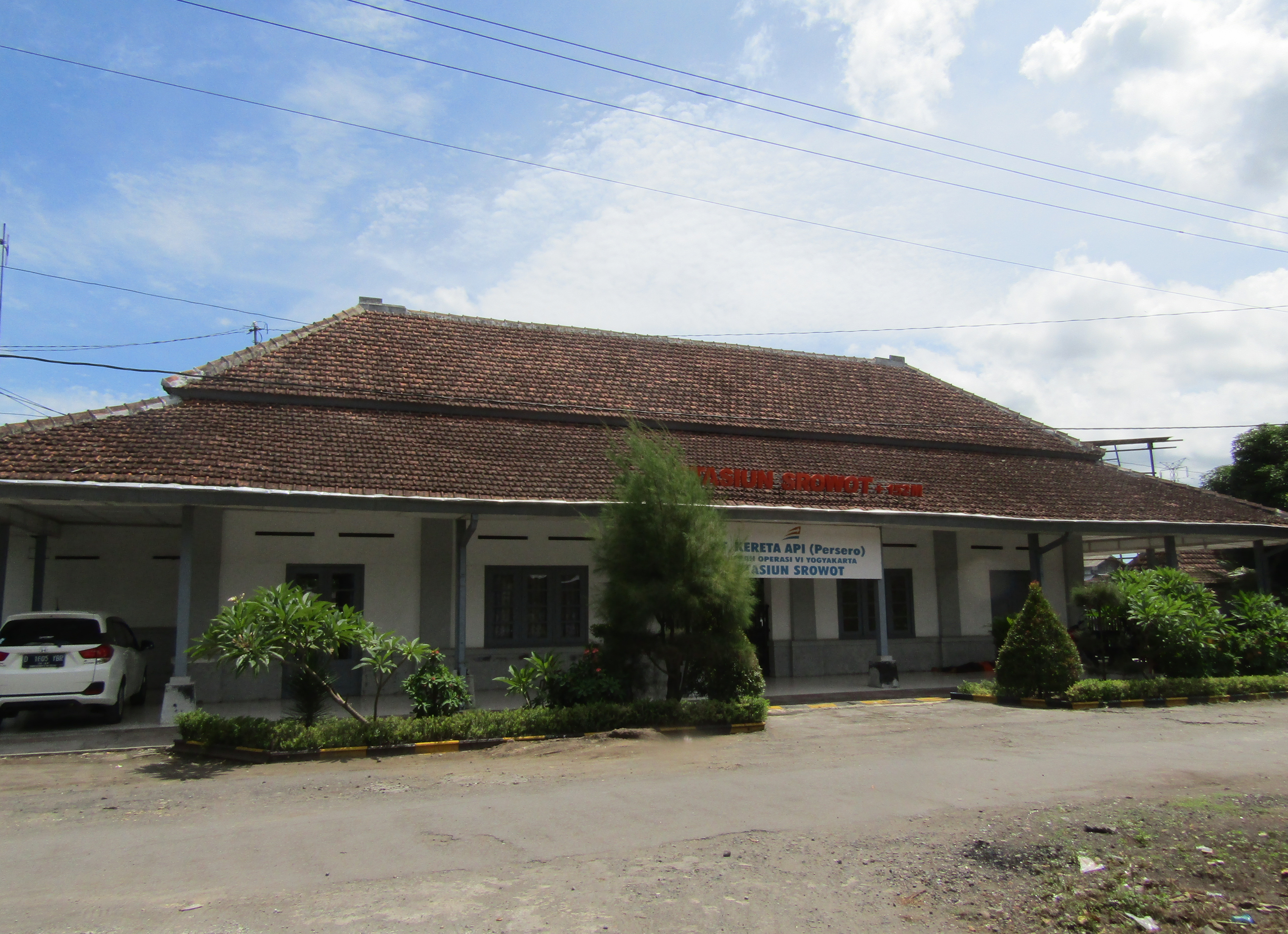 Stasiun Srowot, tahun 2018